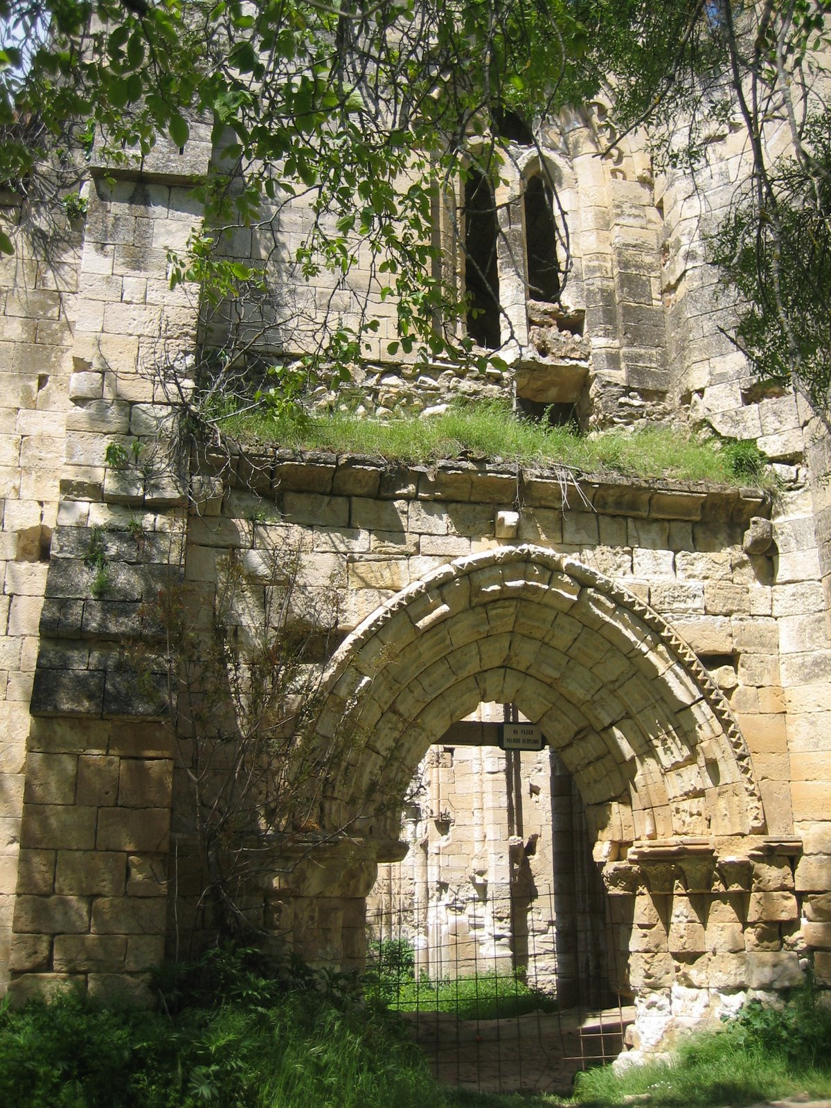 Monasterio de Bonaval situado en el municipio español de Retiendas (Guadalajara).